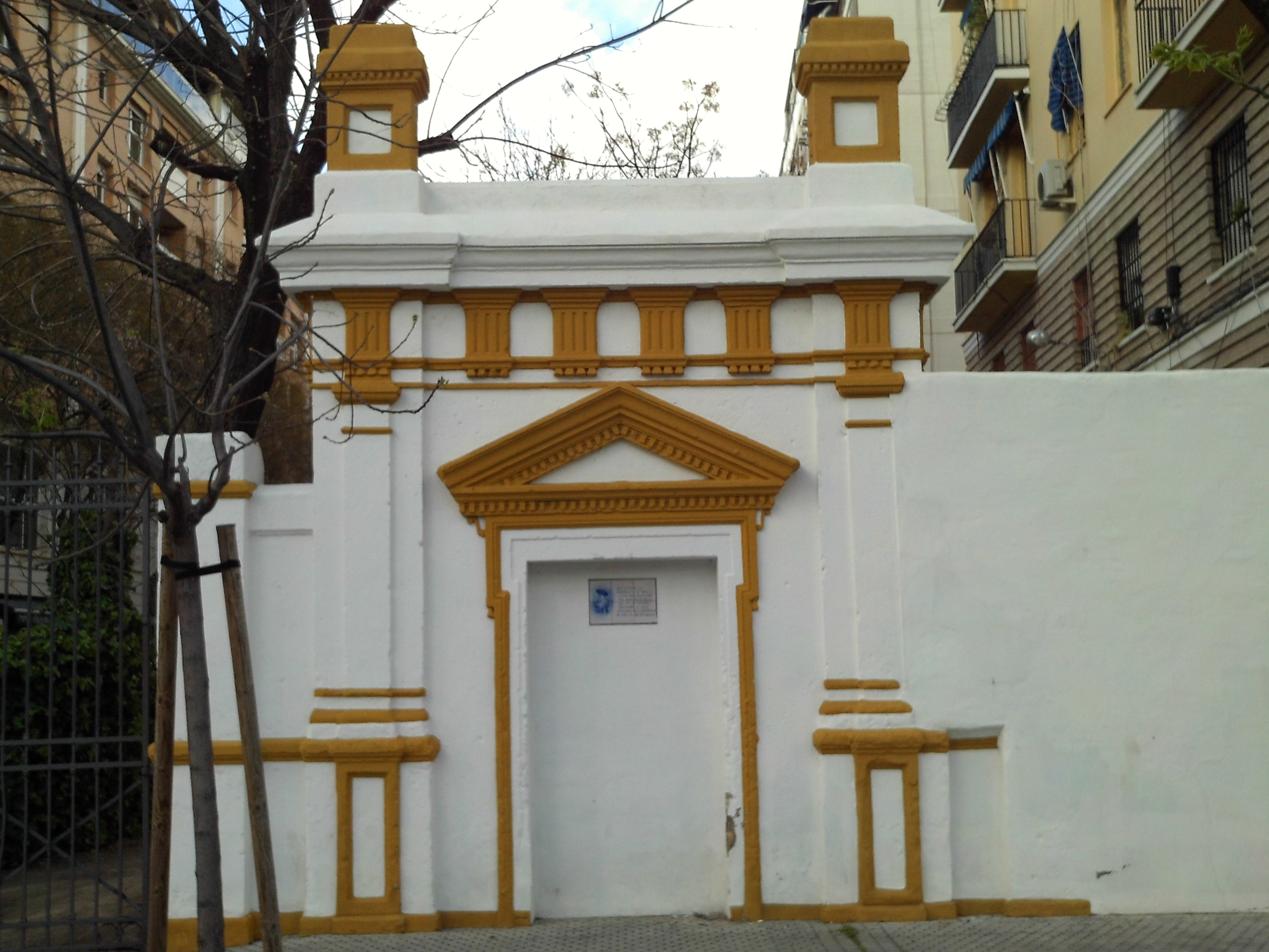 Resto de la plaza Monumental de Sevilla. Andalucía, España.